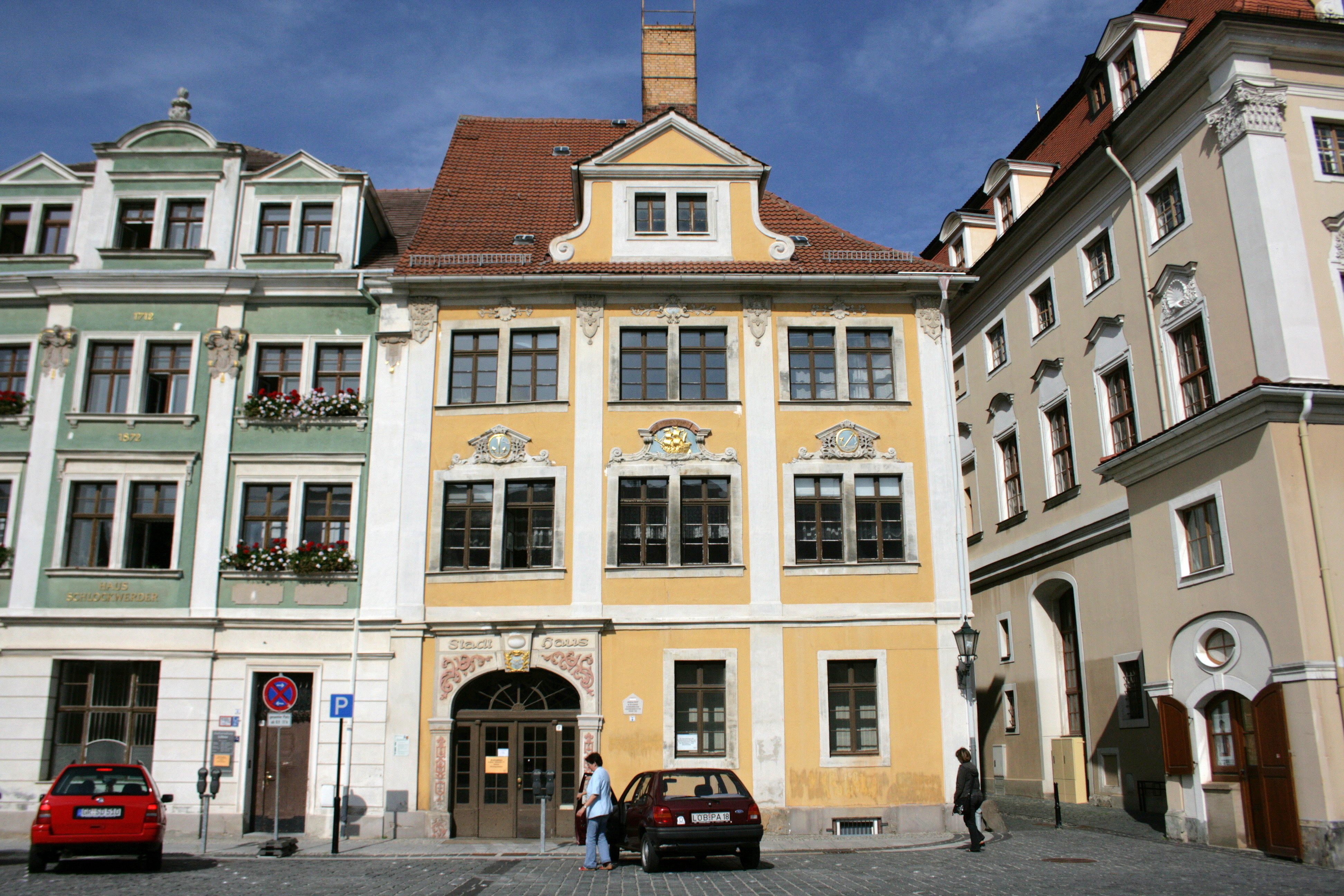 Stadthaus, Altmarkt 17 in Löbau